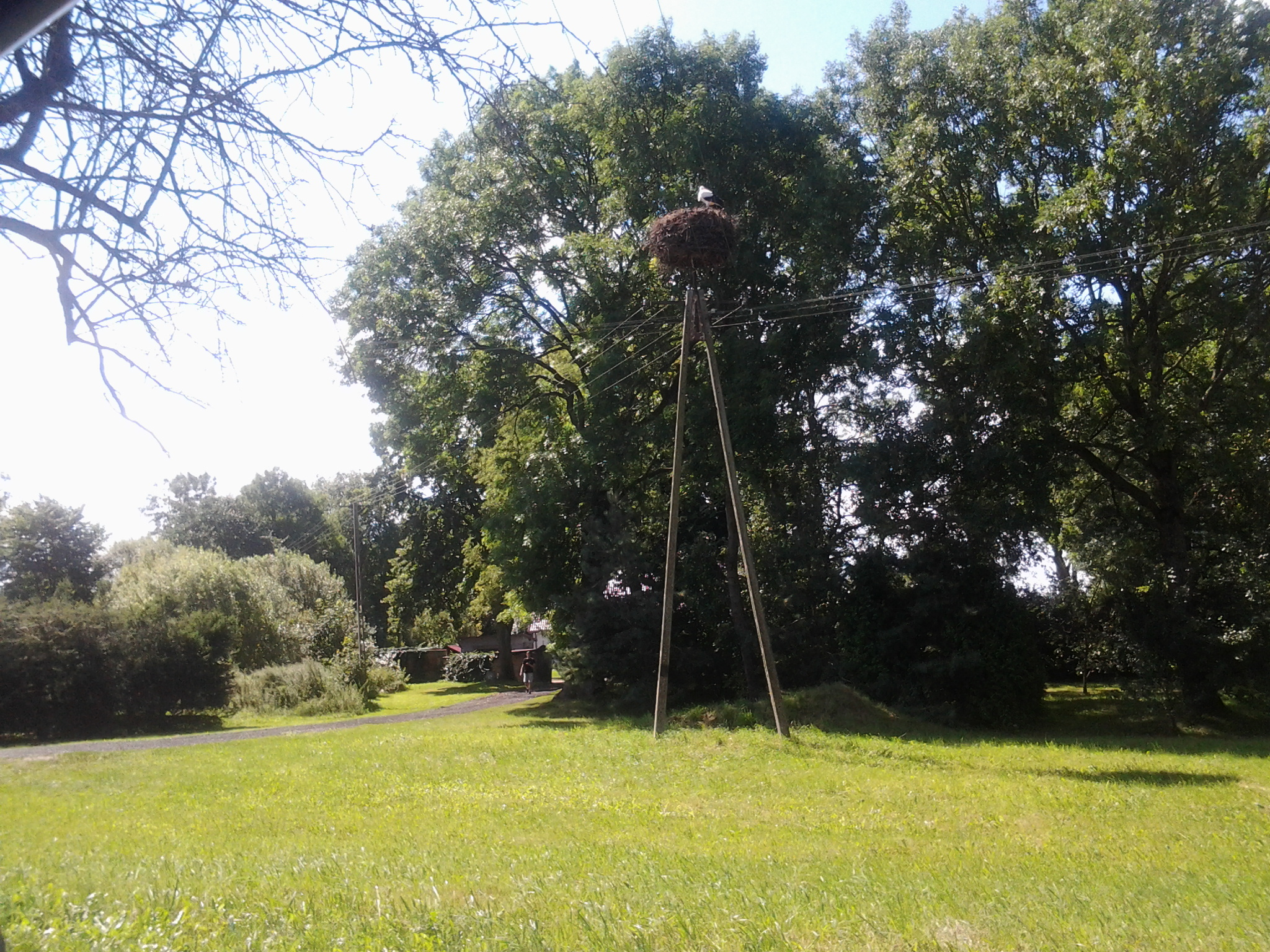 Bocianie gniazdo w Drzonowie